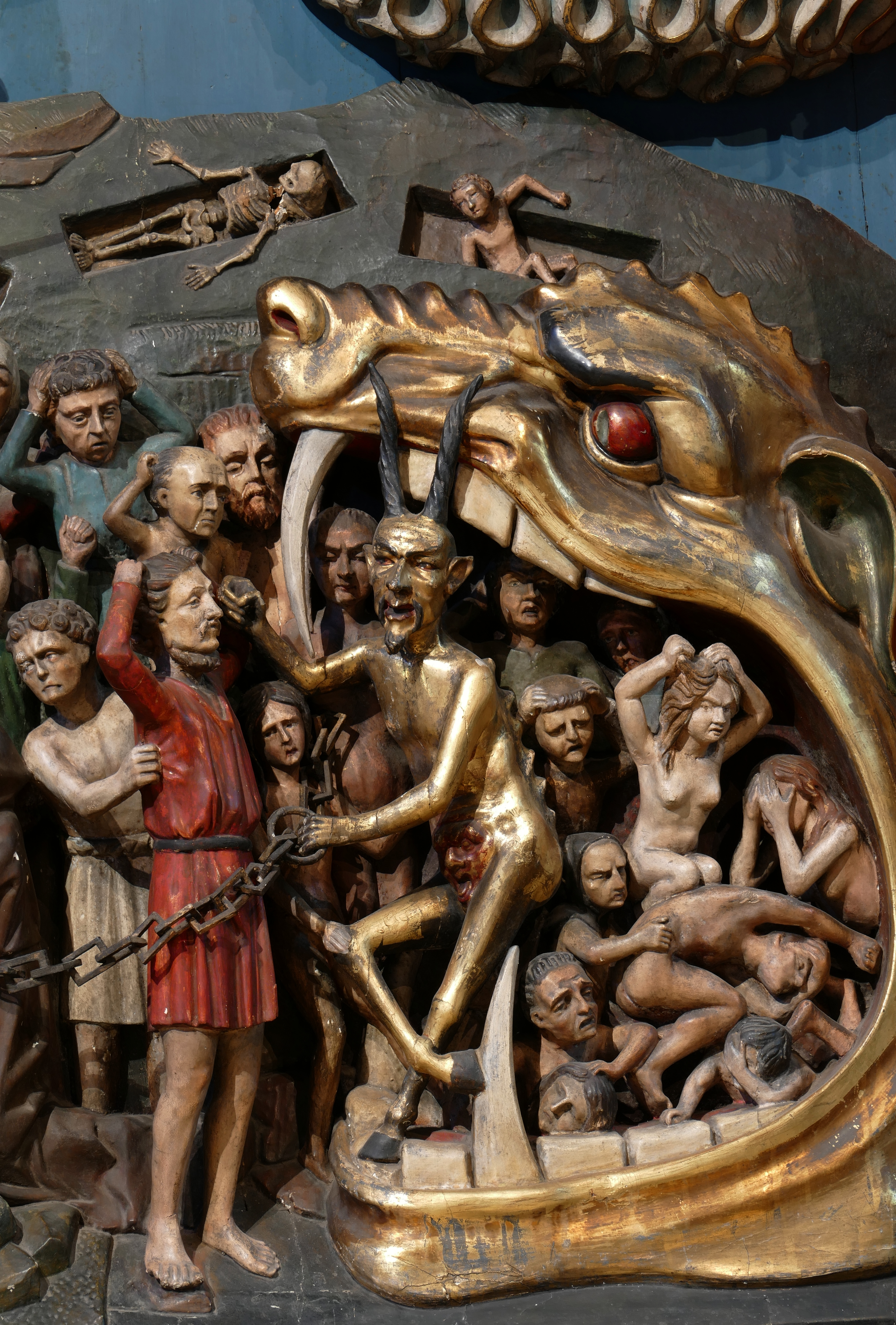 Alsace, Bas-Rhin, Église Saint-Georges de Haguenau (PA00084724, IA00061901). Retable "Jugement dernier" (Veit WAGNER, 1496): Saint Michel pesant les âmes, élus et damnés. This object is classé Monument Historique in the base Palissy, database of the French furniture patrimony of the French ministry of culture, under the references PM67000542 and IM67002088.